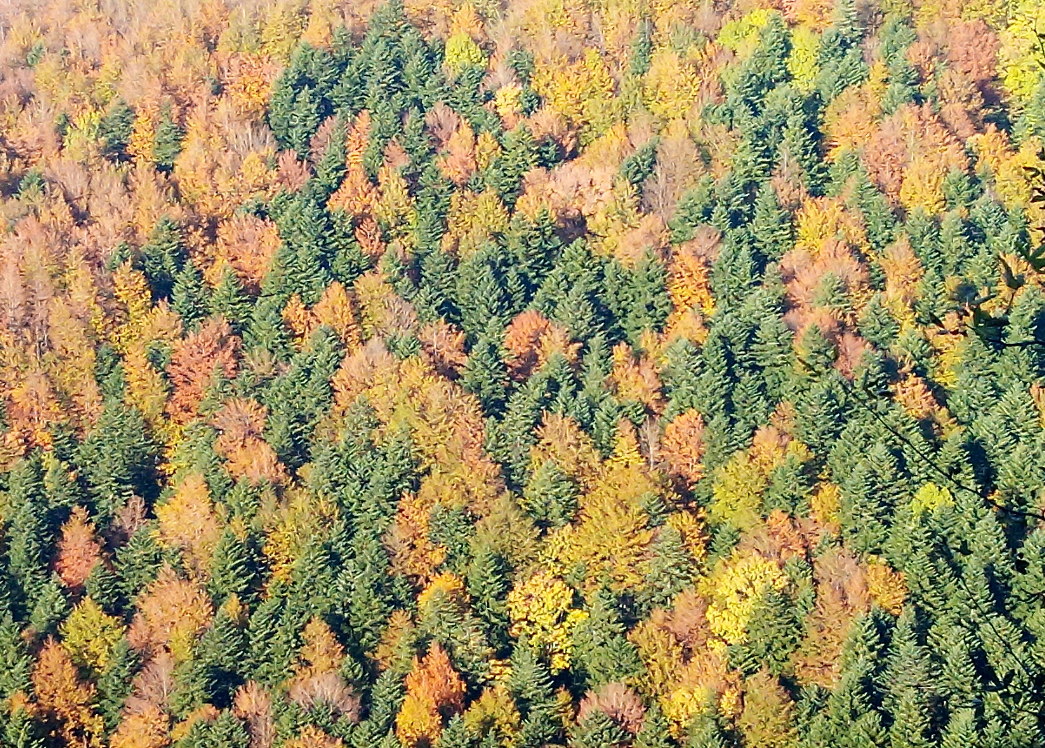 Colori autunnali nella Foresta della Lama (Campigna, Emilia-Romagna)